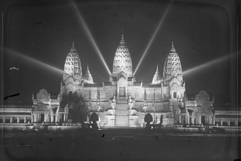 Wie ein Märchen aus 1000 und einer Nacht... ..mutet der indische Tempel auf der Kolonial-Ausstellung in Paris an.